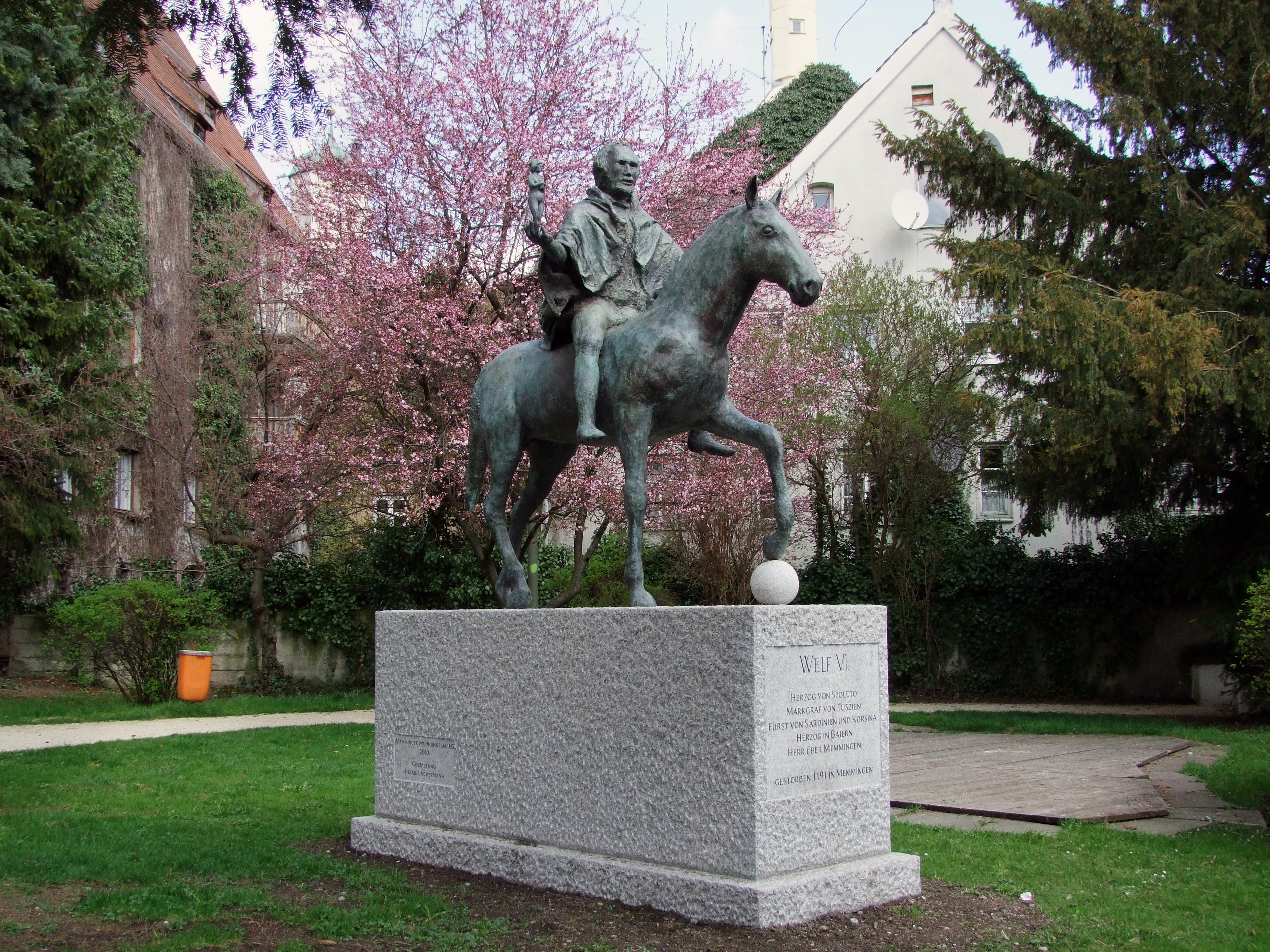 Reiterstandbild vom Milden Welf im oberschwäbischen Memmingen.